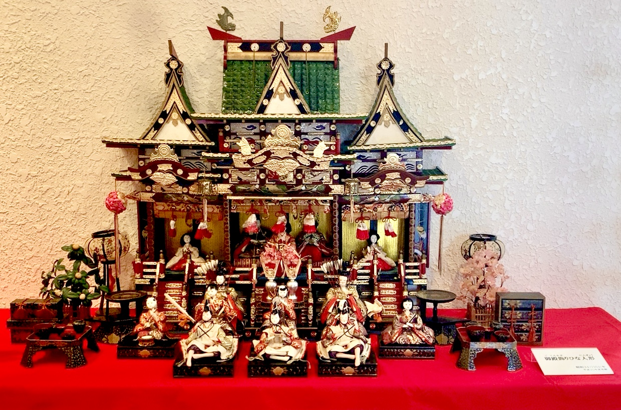 御殿飾りひな人形。1959年製。田原市渥美郷土資料館 収蔵。御殿に収められている。